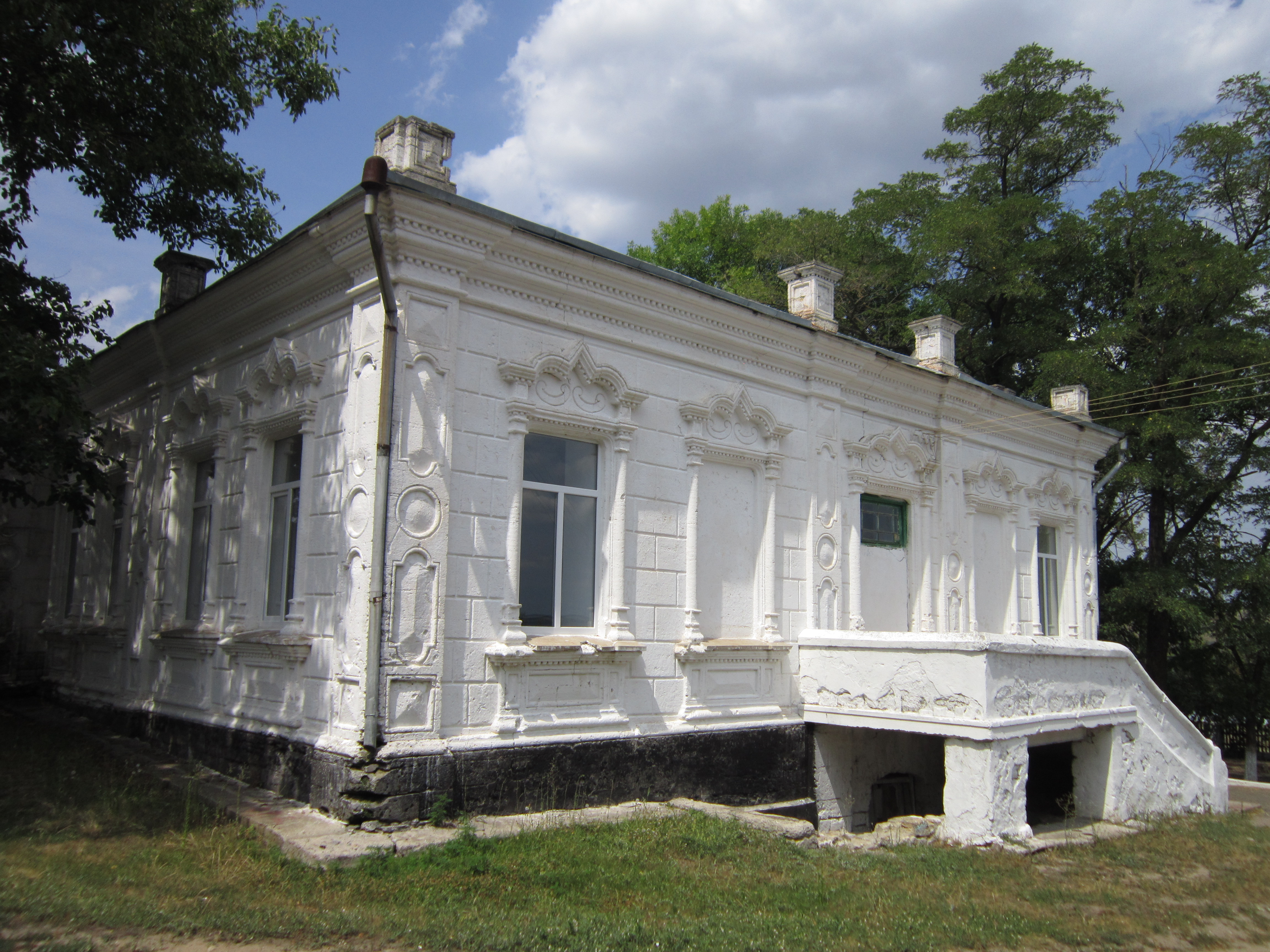 Колишній маєток Л. Юковського, :uk:Михайлопіль, Іванівський район